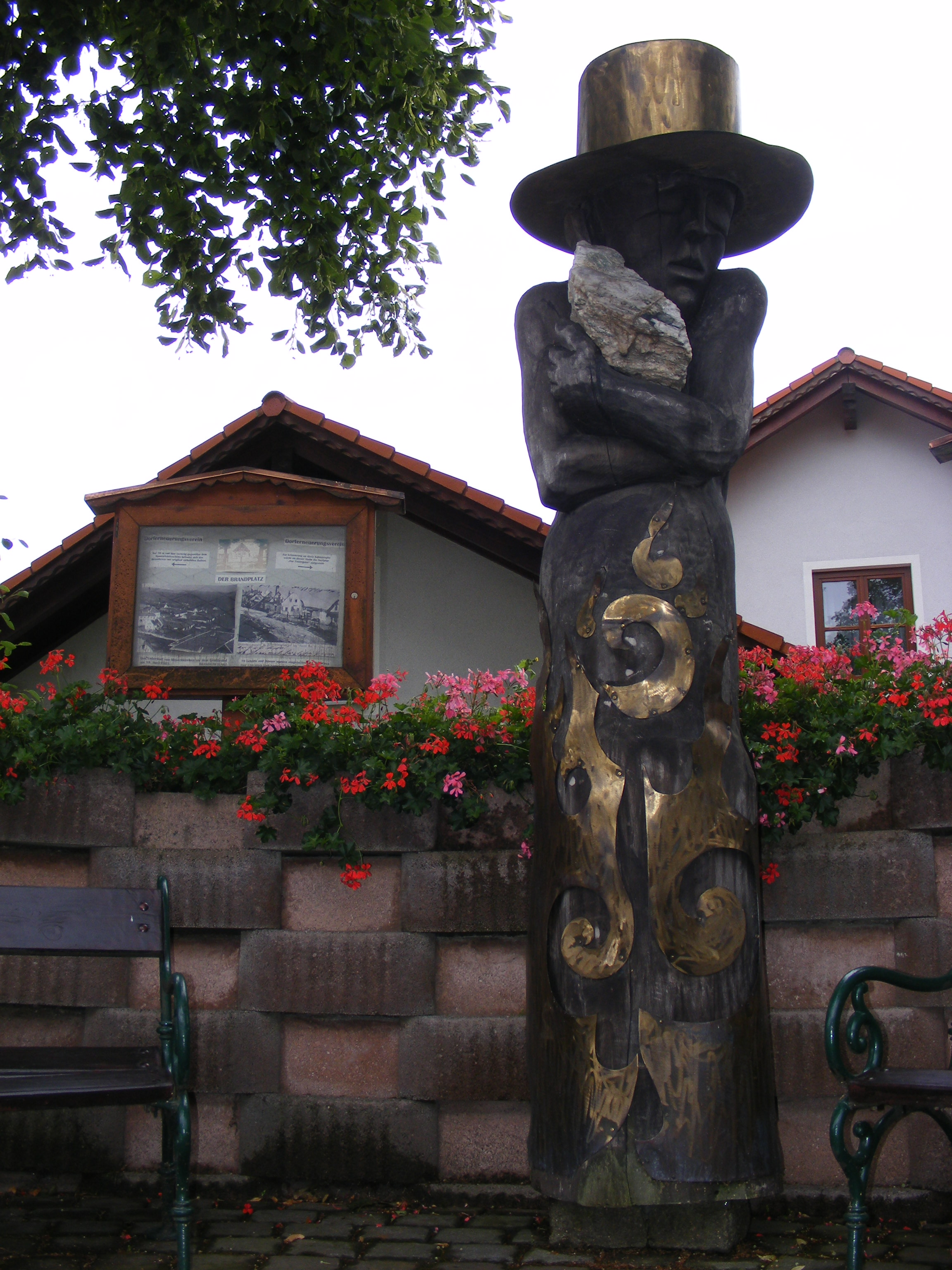 Holzplastik „Feuergeist“ in Mönichkirchen, in Erinnerung an den Großbrand von 1903